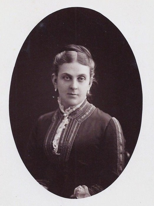 Княгиня Надежда Дмитриевна Белосельская-Белозерская, ур. Скобелева (1847—1920)